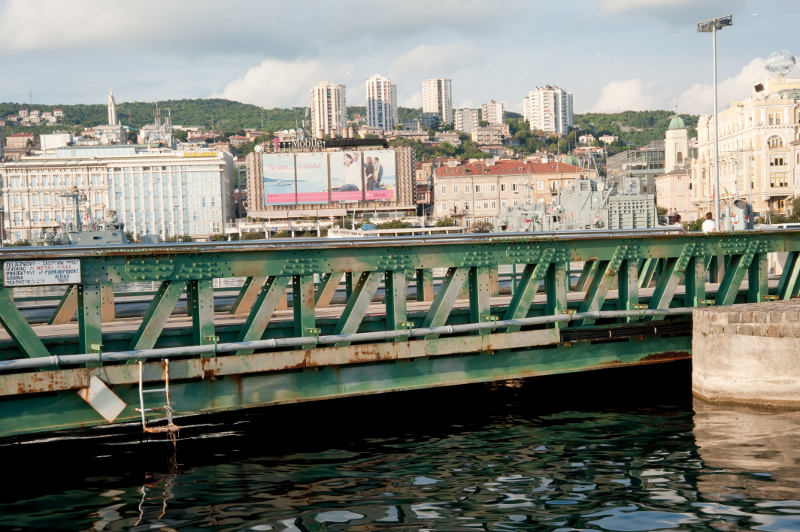 Željeznički most, riječka luka